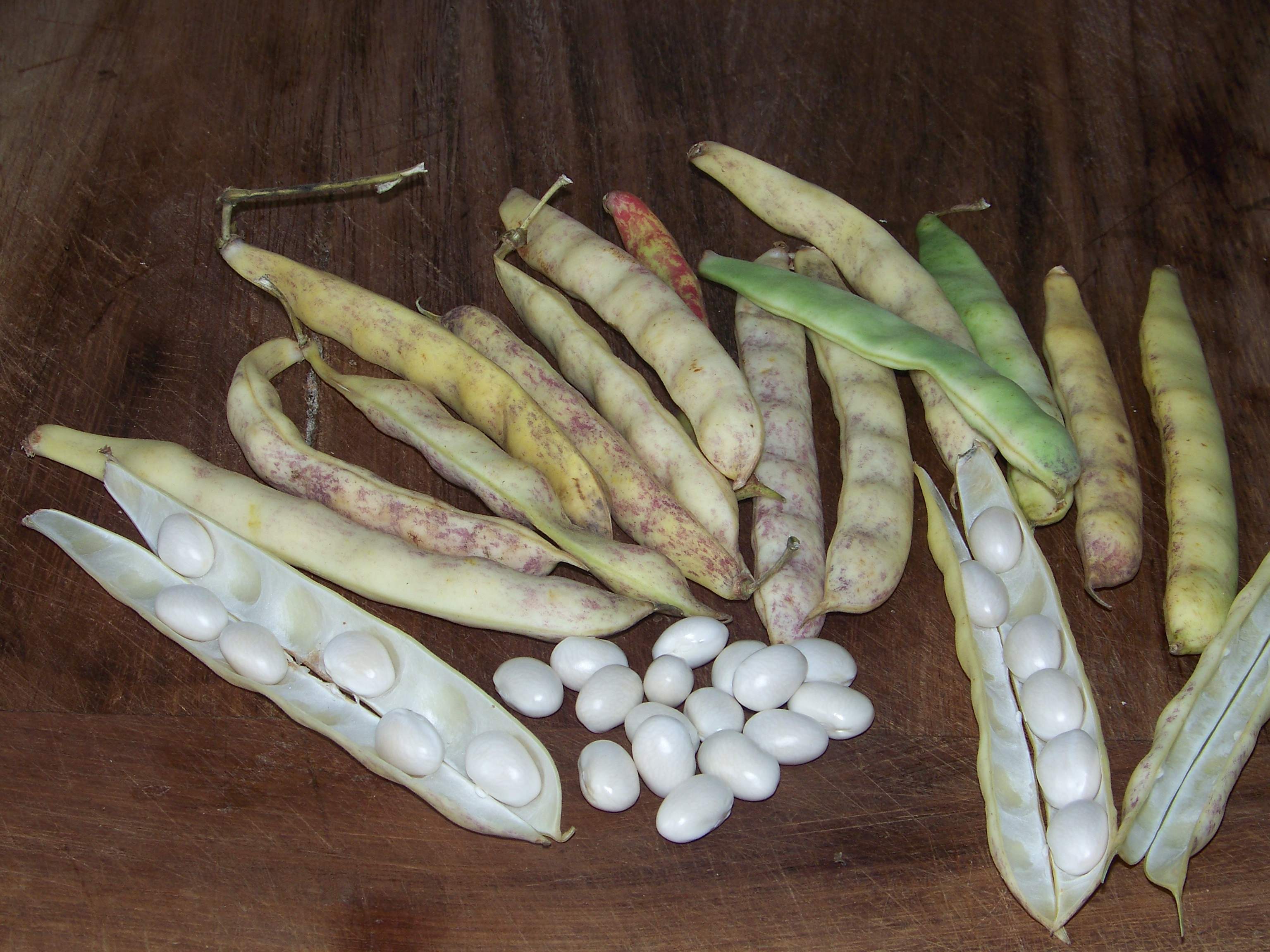 Haricots « Coco de Paimpol »